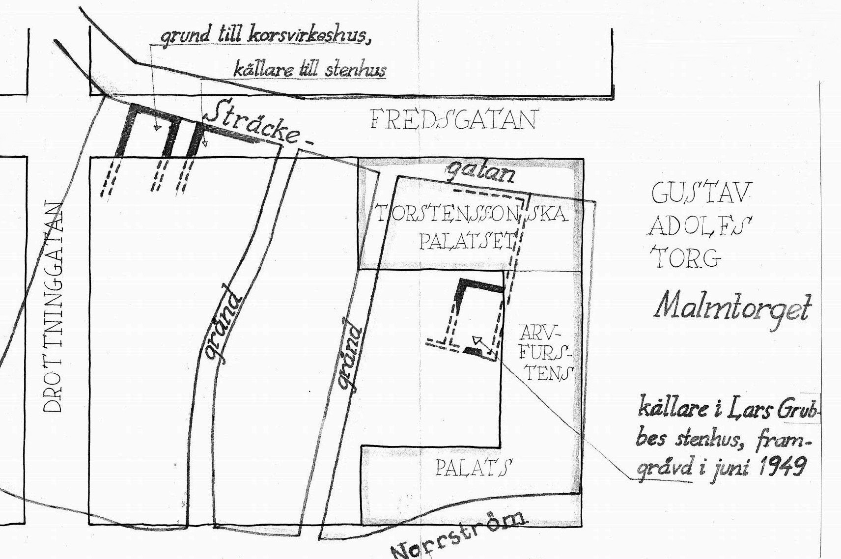 Kvarteret Lejonet före 1640 med grunden för Norrmalms äldsta stenhus